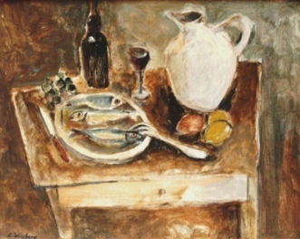 Tableau Nature morte aux poissons et à la cruche, de Léon Weissberg